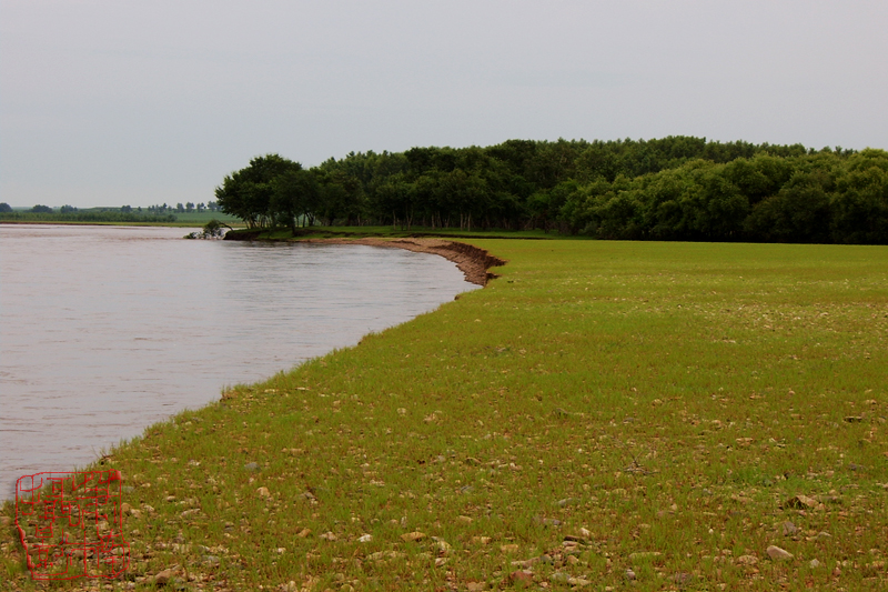 蜿蜒曲折阿伦河 QQ696847